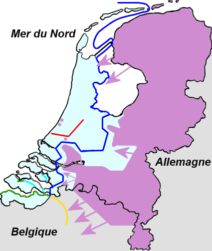 Situation militaire aux pays-bas durant les derniers jours de l'invasion allemande aux Pays-Bas (10 mai 1940).